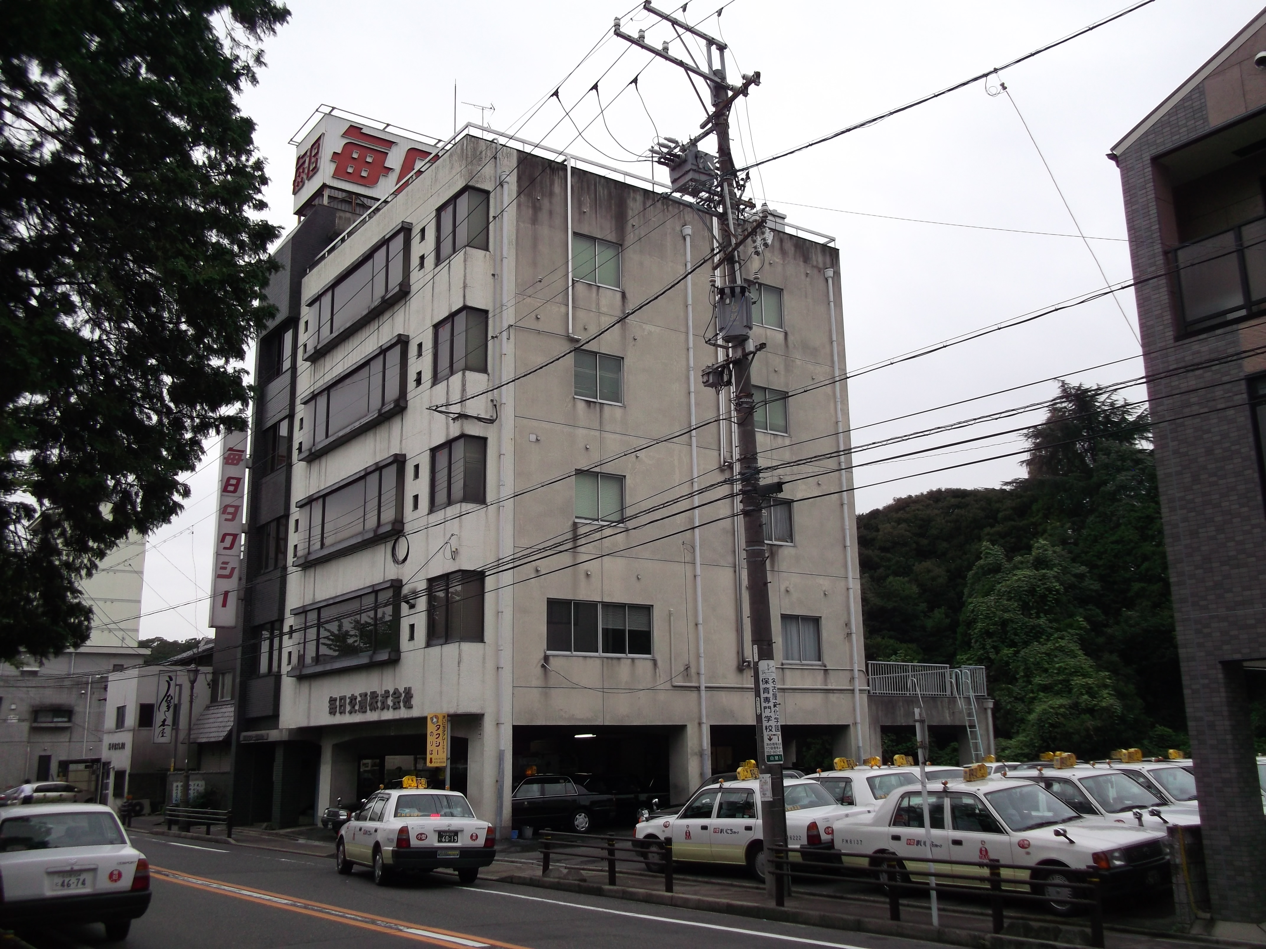 名古屋市東区東外堀町の毎日タクシー協同組合を東側公道北側より撮影